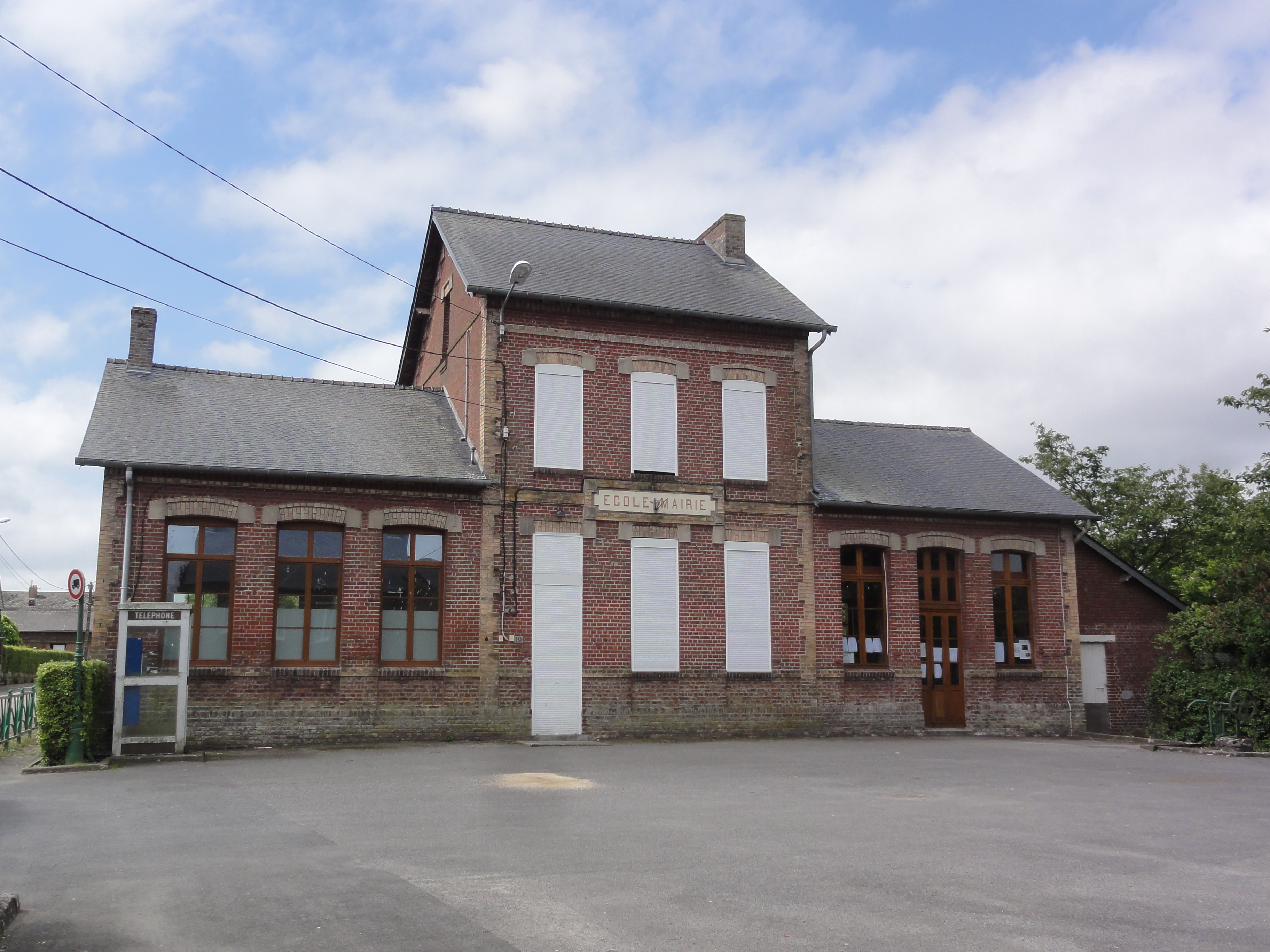 Sommeron (Aisne) mairie-école